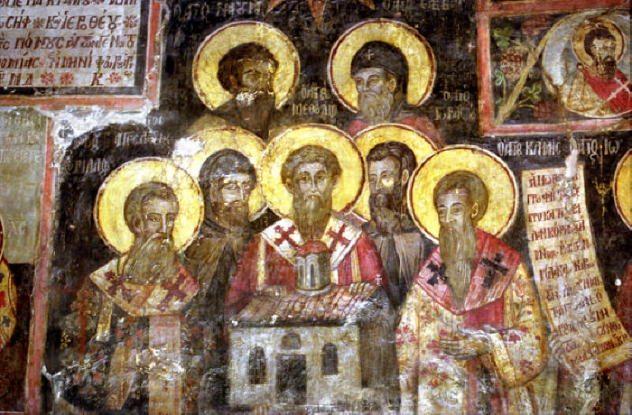 Св. Седмочисленици и св. Йоан Кукузел. Стенопис от 1744 г. от главния храм на манастира в Арденица (днешна Албания), изграден върху основите на черквата "Св. Троица", строена с ктиторството на св. цар Борис Покръстител. Изписан от братята Константин и Анастас Зограф от Корча.